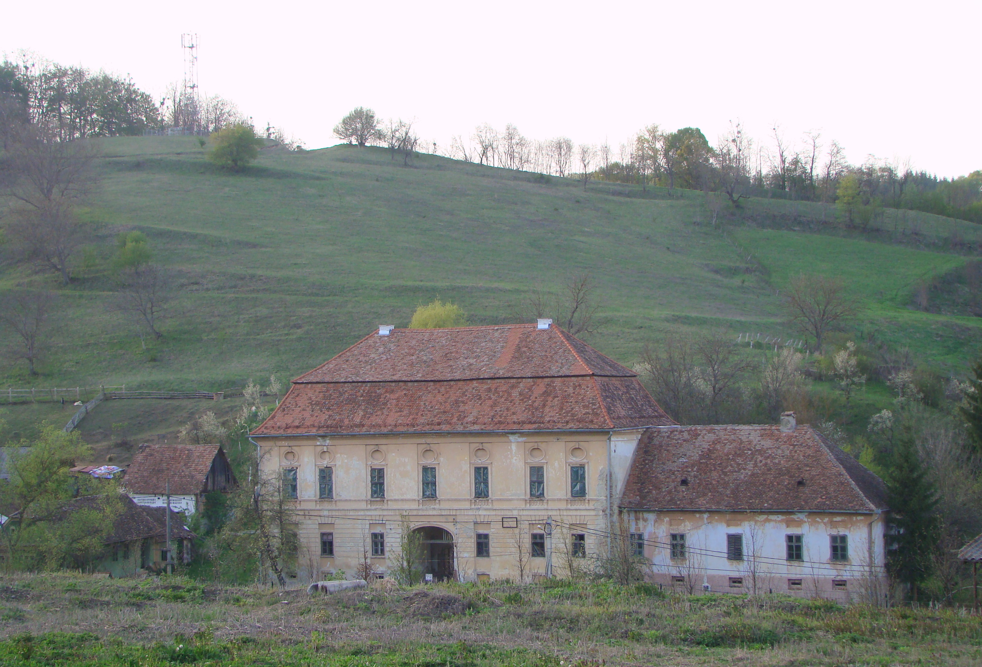 Casa Ioan Bethlen, apoi primărie, sat Criș; comuna Daneș 176 sec. XVII-XIX